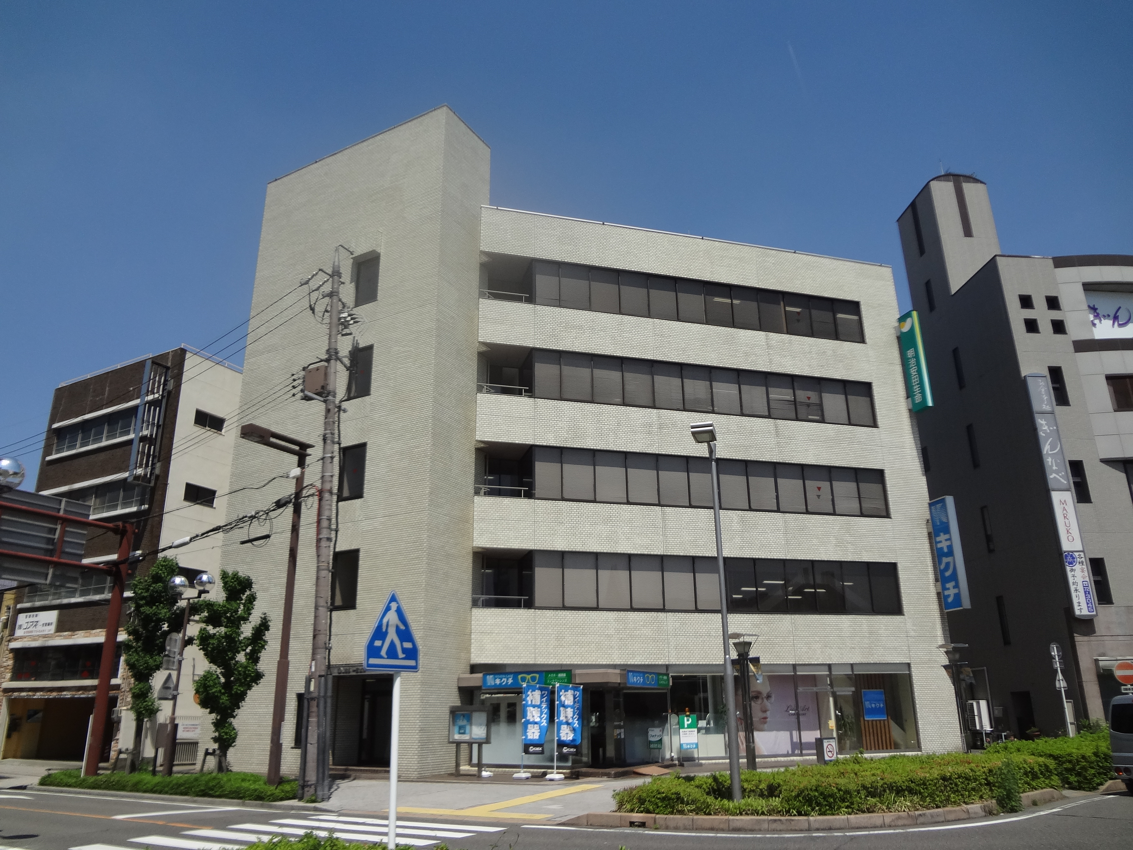 JES一宮ビル